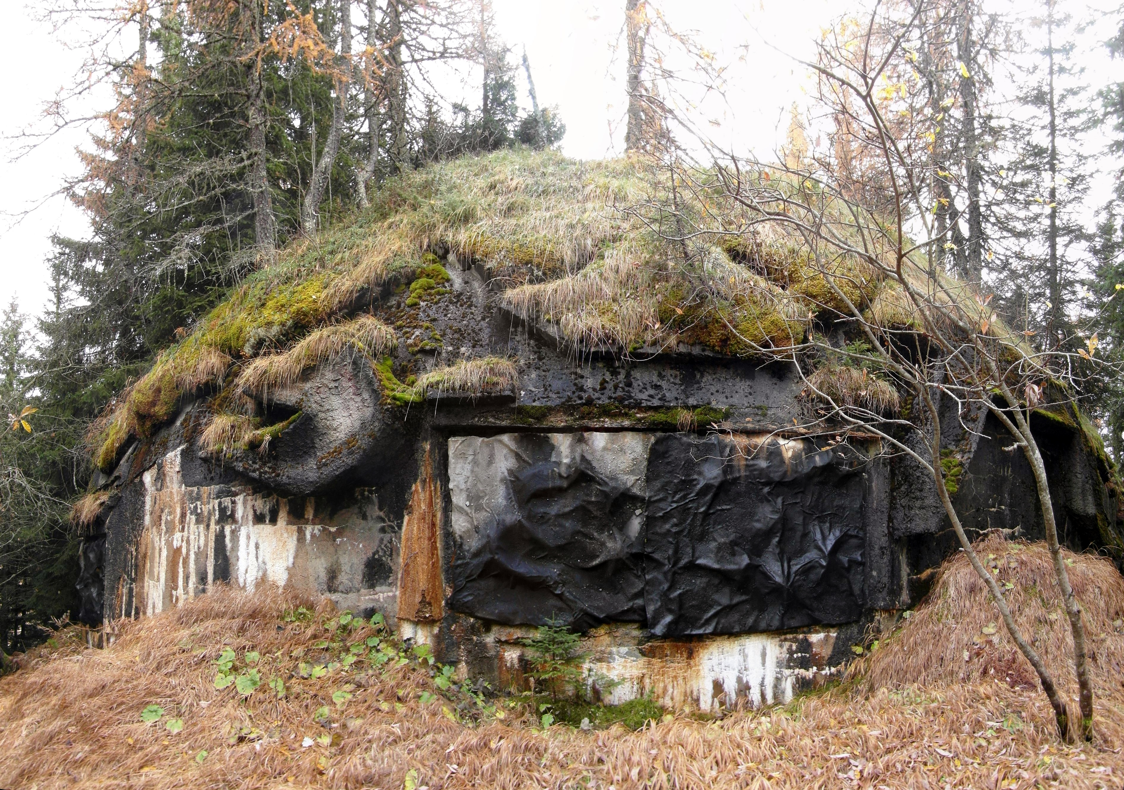 Opera 13 Passo Monte Croce di Comelico